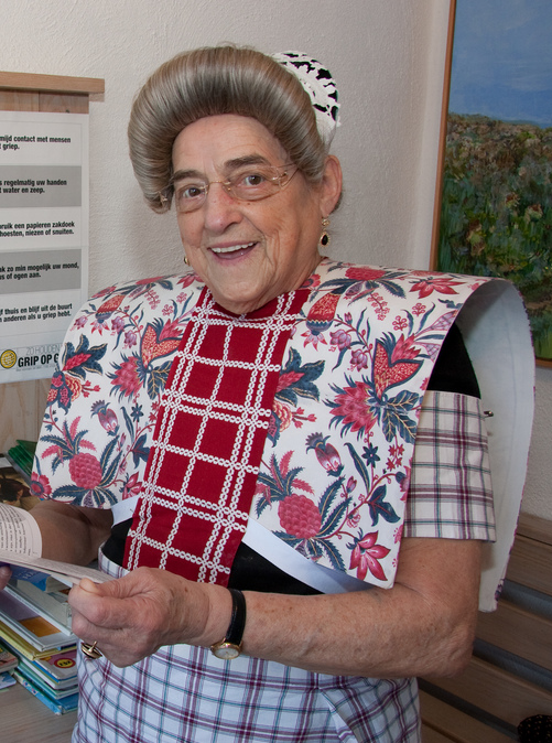 Spakenburg is een van de weinige Nederlandse plaatsen waar - vooral oudere - vrouwen nog klederdracht dragen.